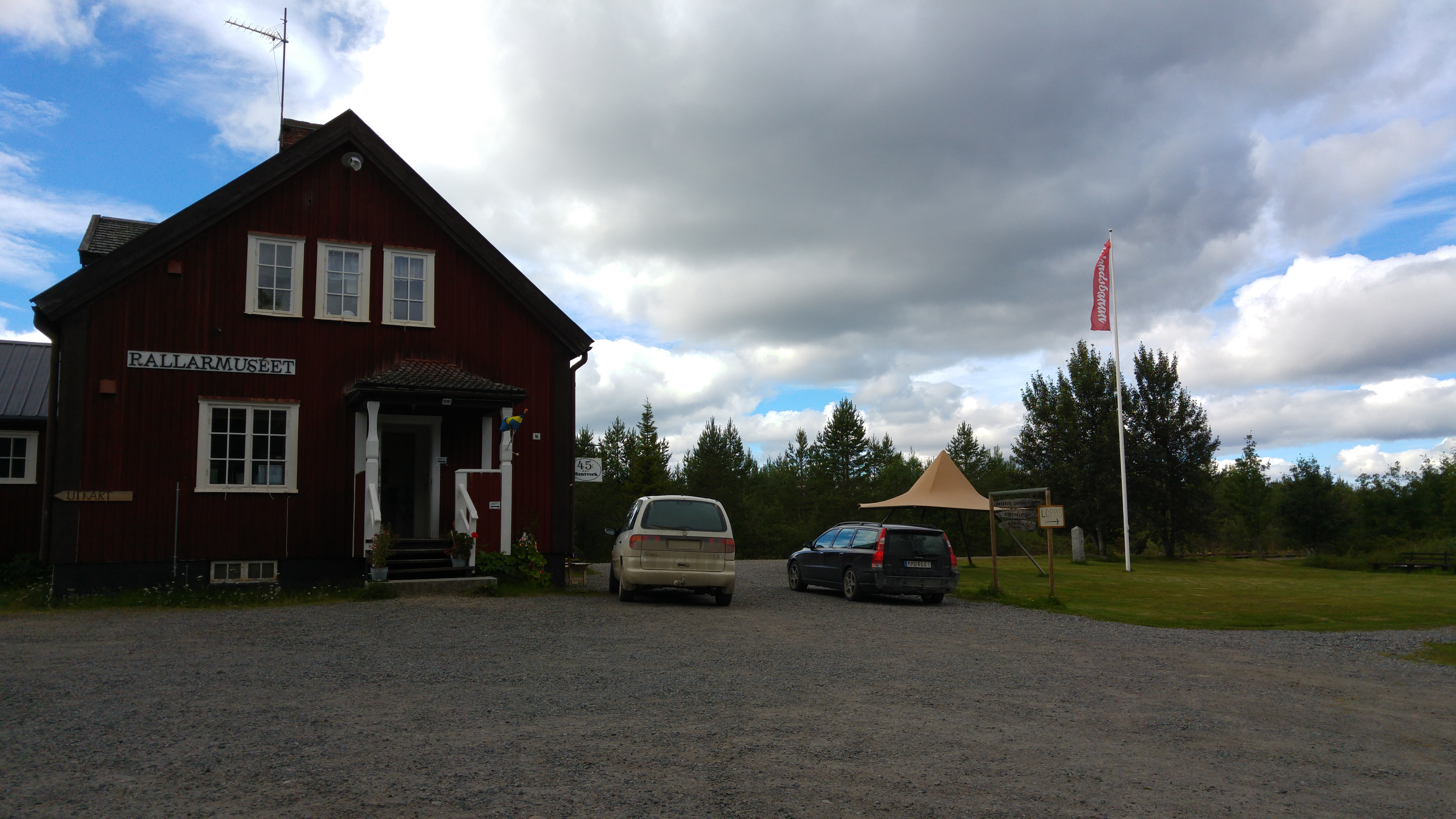 Rallarmuseet. Arvidsjaur, Moskosel